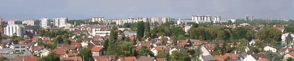 Vue prise par Hervé SUAUDEAU (Utilisateur:Suaudeau) du clocher de la mairie d'Aulnay-sous-Bois. Vue en direction du Nord, avec les grands ensembles au fond et les zonnes pavillonaires devant (2004). Catégorie:Image de Aulnay-sous-Bois